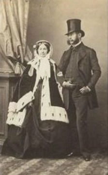 Граф Николай Трофимович Баранов с женой